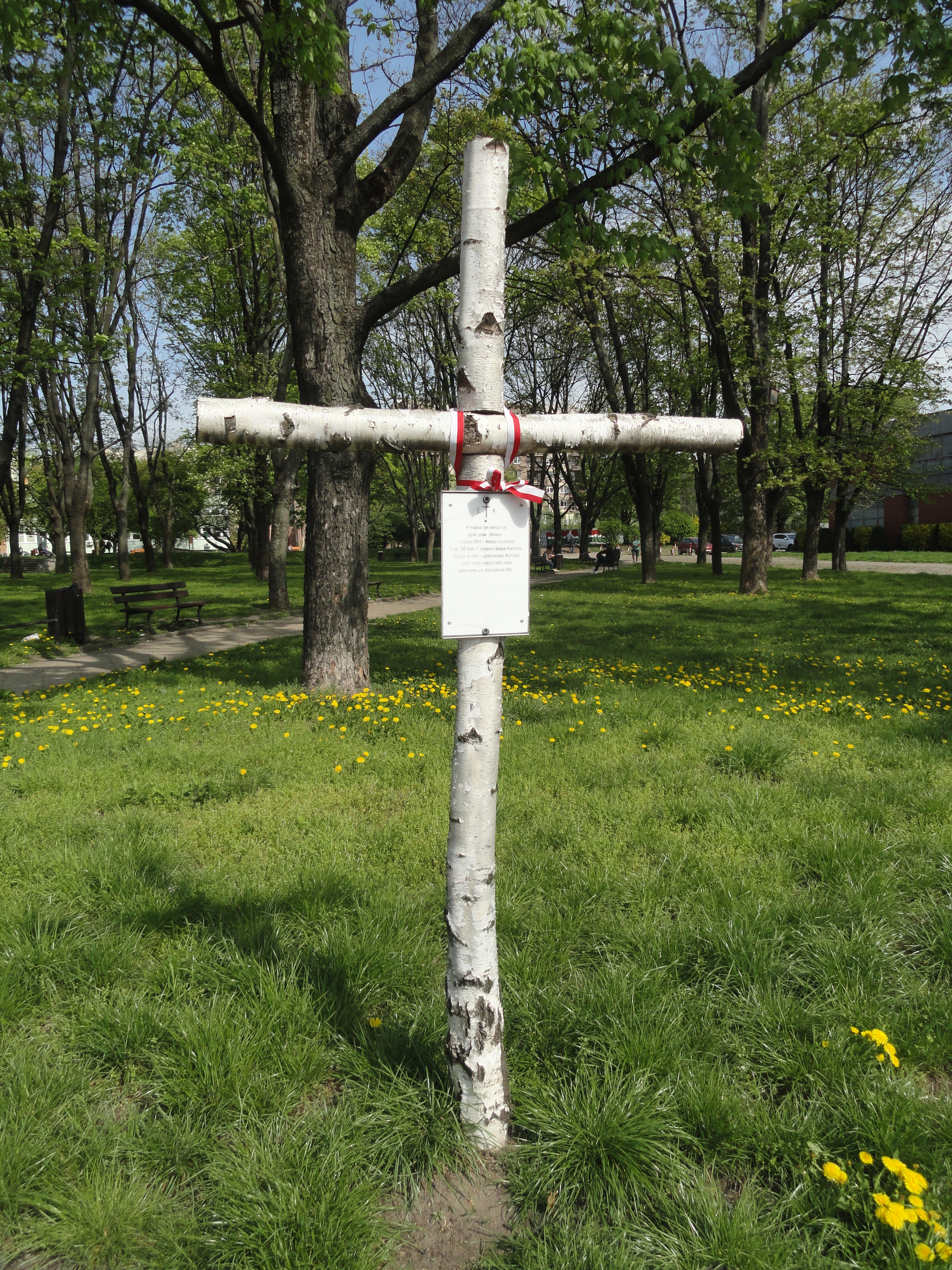 Krzyż przy alei Solidarności w Warszawie niedaleko Młynarskiej upamiętniający ofiary rzezi Woli na dawnym ogrodzie zabaw Wenecja